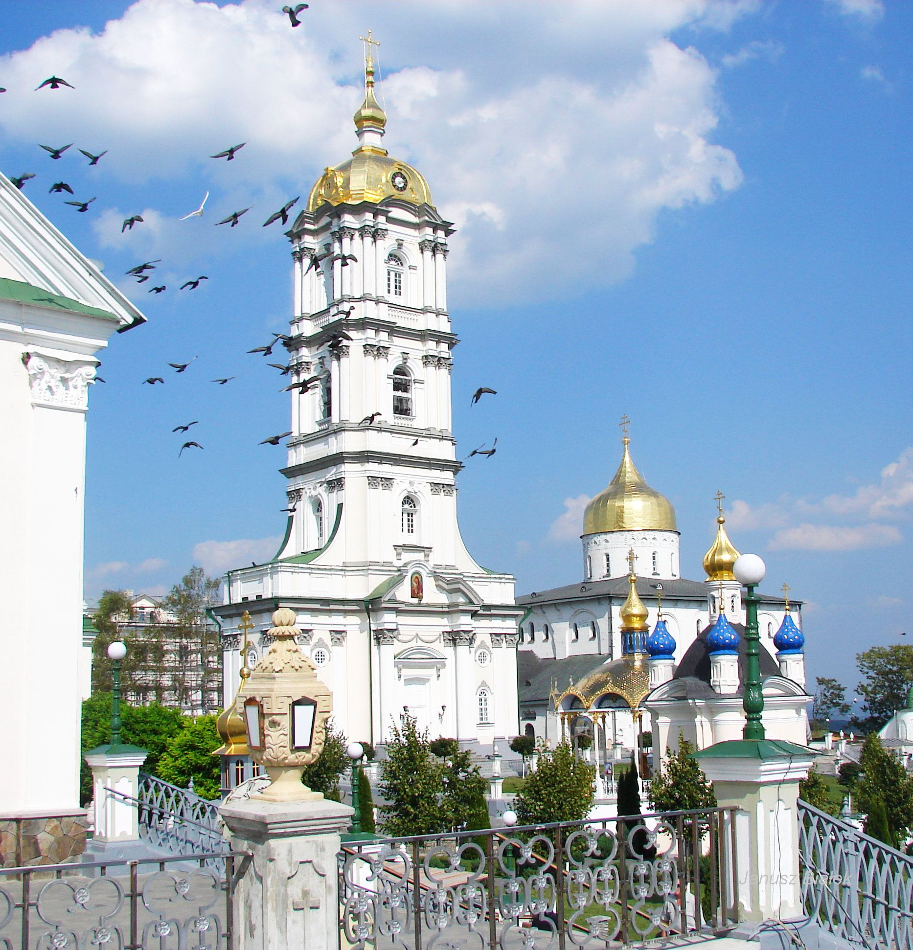 Pochaiv, Ternopil's'ka oblast, Ukraine